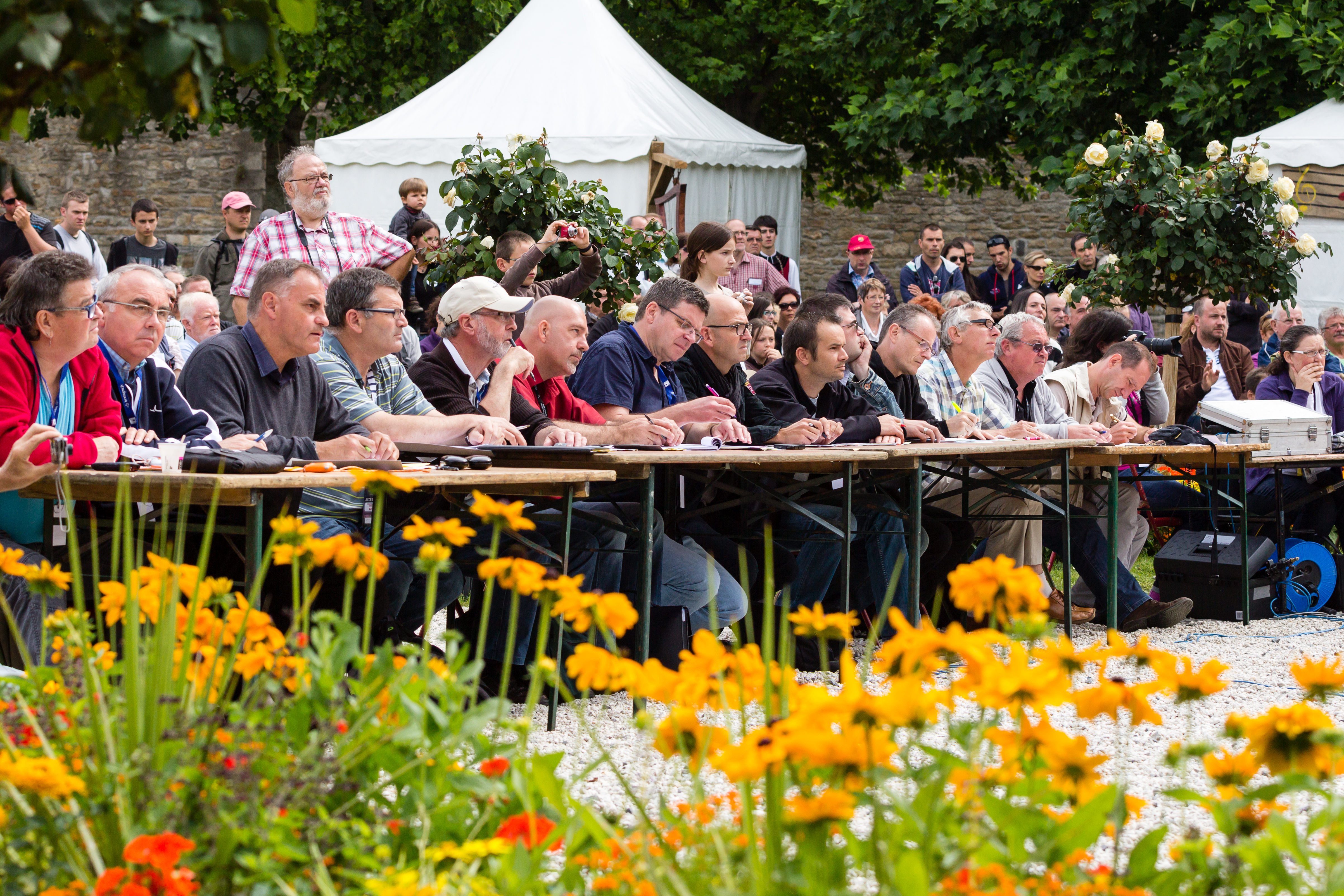 Le jury du championnat national des badagoù (deuxième catégorie) au FIL 2012.